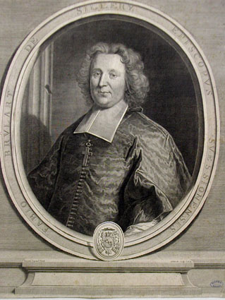 Fabio Brulart de Sillery